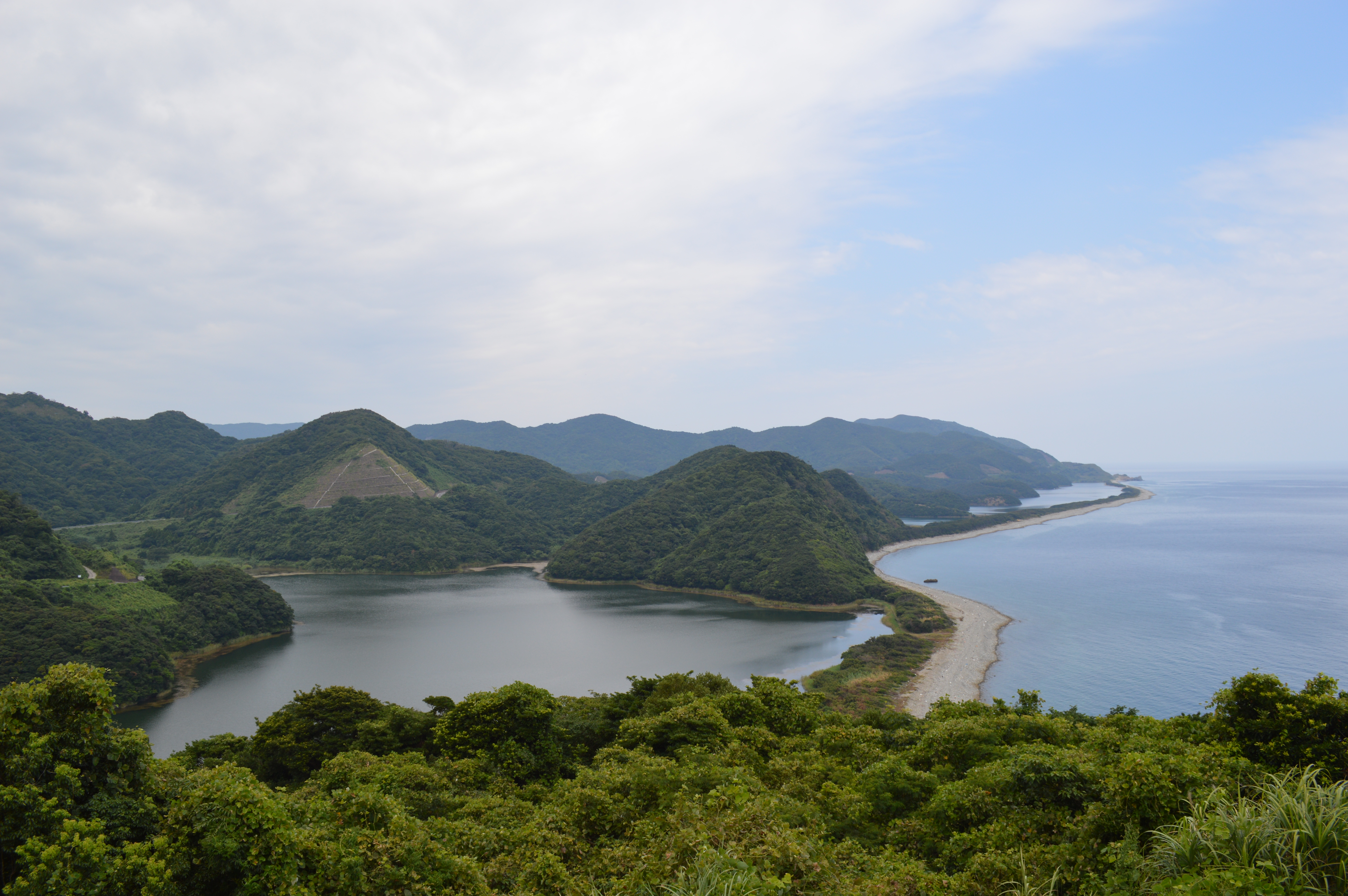 鹿児島県薩摩川内市の上甑島、長目の浜展望所から見た長目の浜